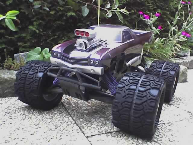 HPI-Savage